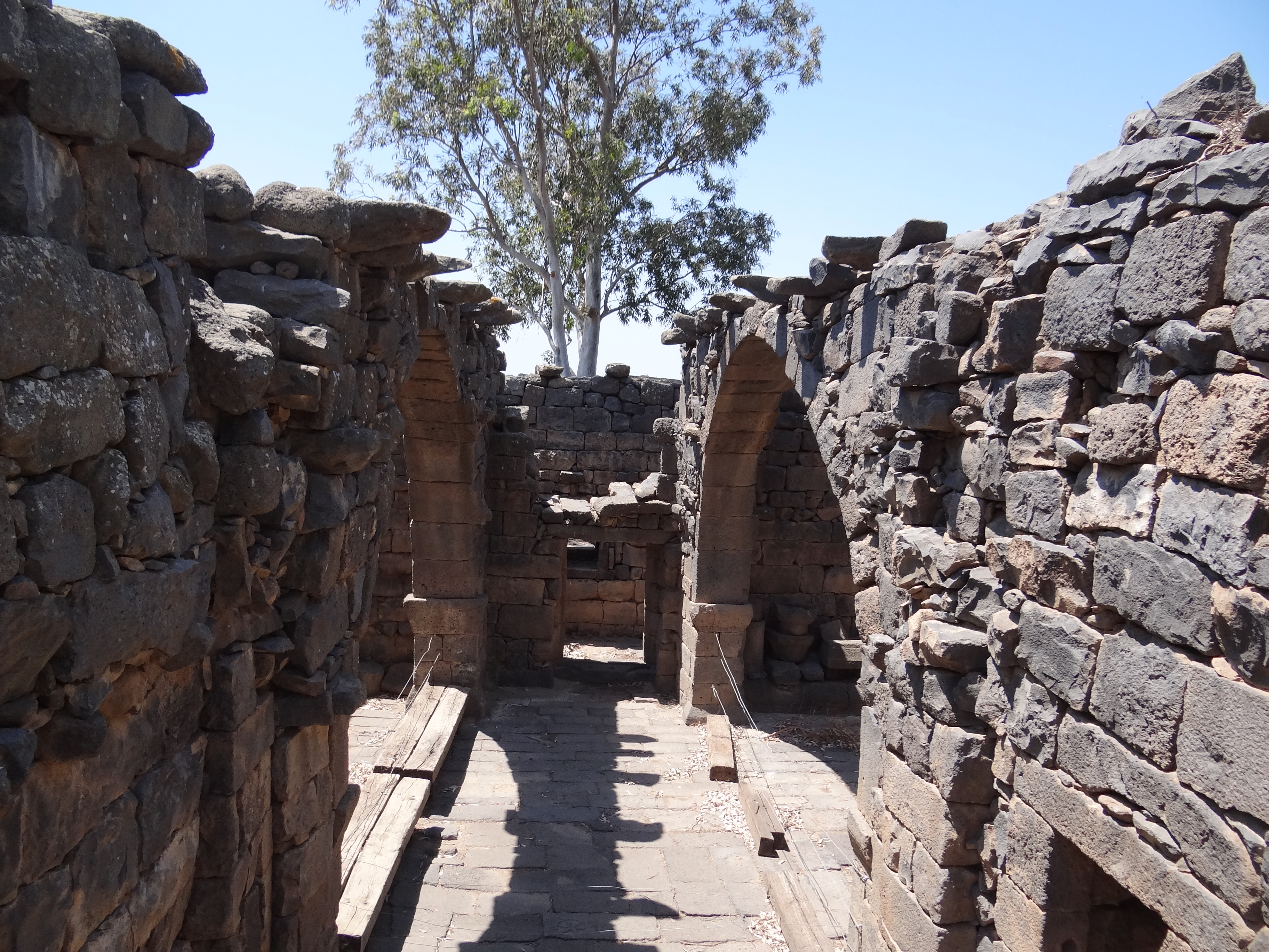 Deir Qeruh, Archaeology site in Golan Heights דיר קרוח - שרידי כפר עתיק הנמצאים בשמורת גמלא שברמת הגולן שרידי הכנסייה מהתקופה ההביזנטית